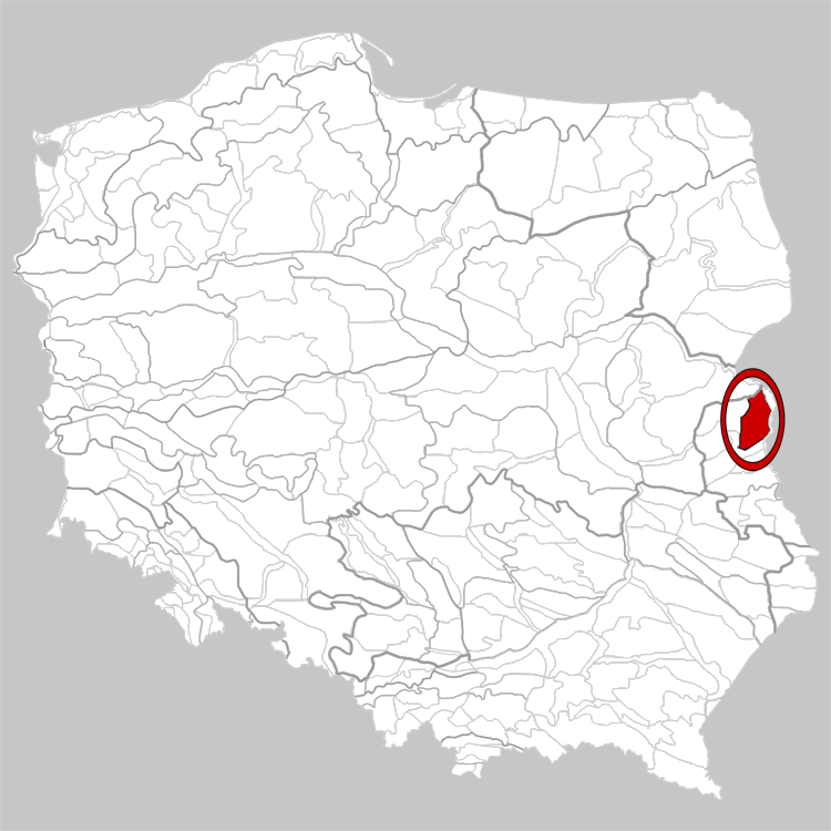 Physico-geographical regionalization of Poland Mezoregion 845.12 Kodeń Plain Regionalizacja fizycznogeograficzna Polski Mezoregion 845.12 Równina Kodeńska